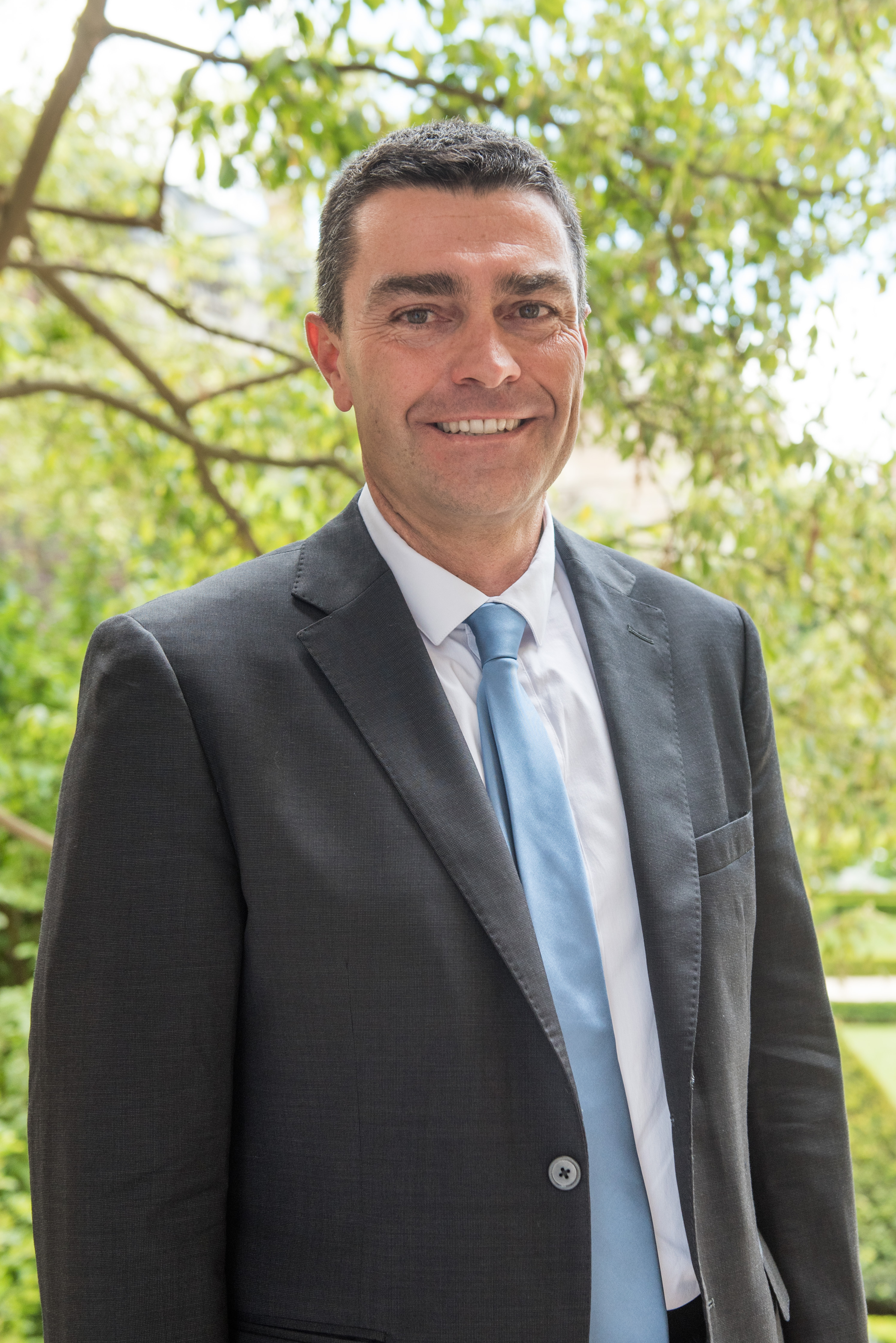 Eric Pauget dans le jardin des Quatre colonnes du palais Bourbon en 2017.